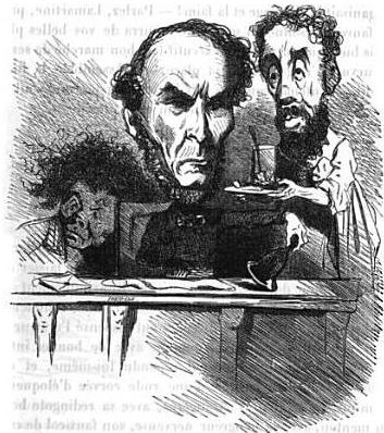 Caricature d'Antoine Sénard (au centre) et Marie-Anne-Joseph Degousée (à droite), par Cham.